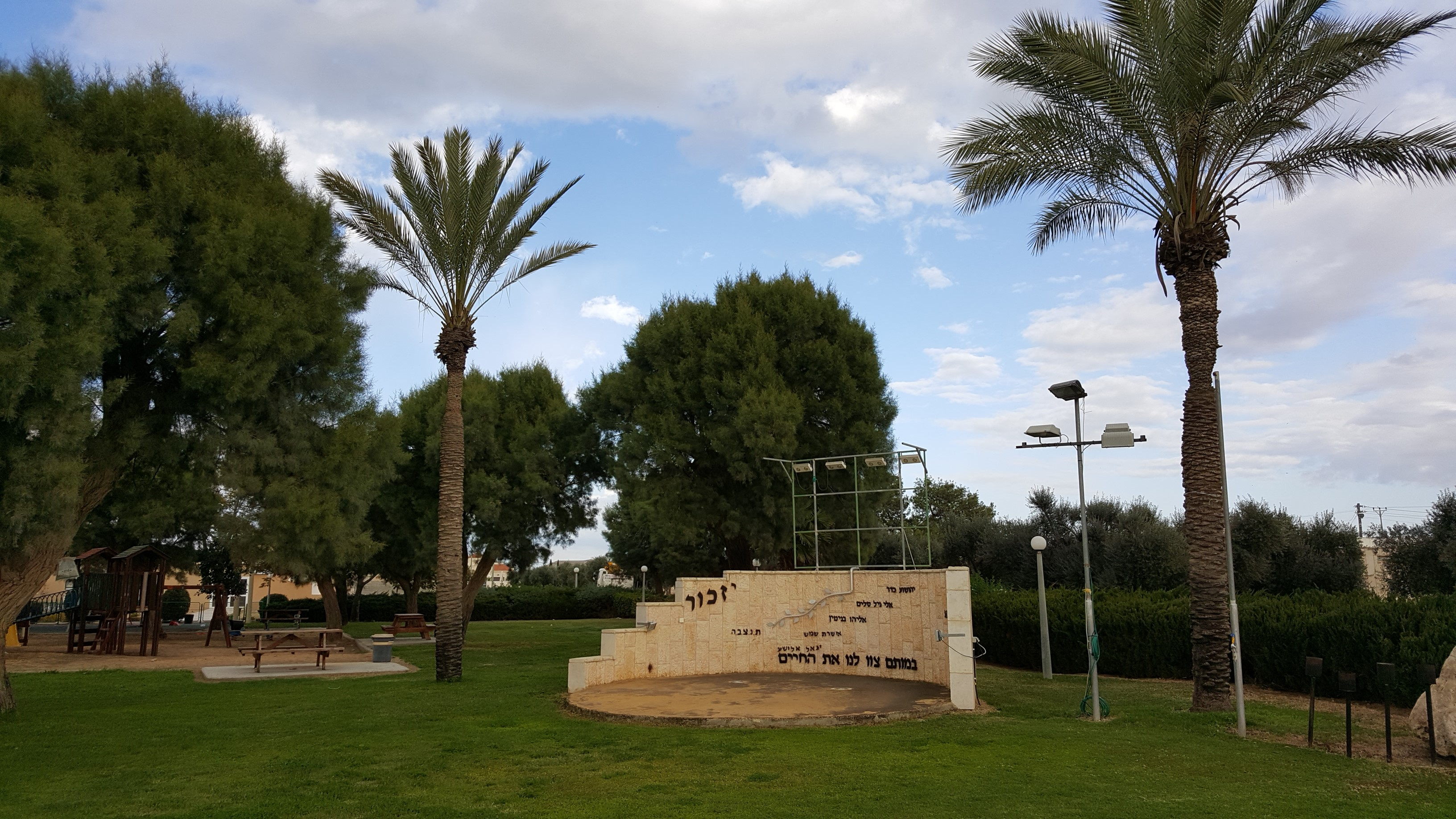 פינת זיכרון לחללי צה"ל במושב רנן